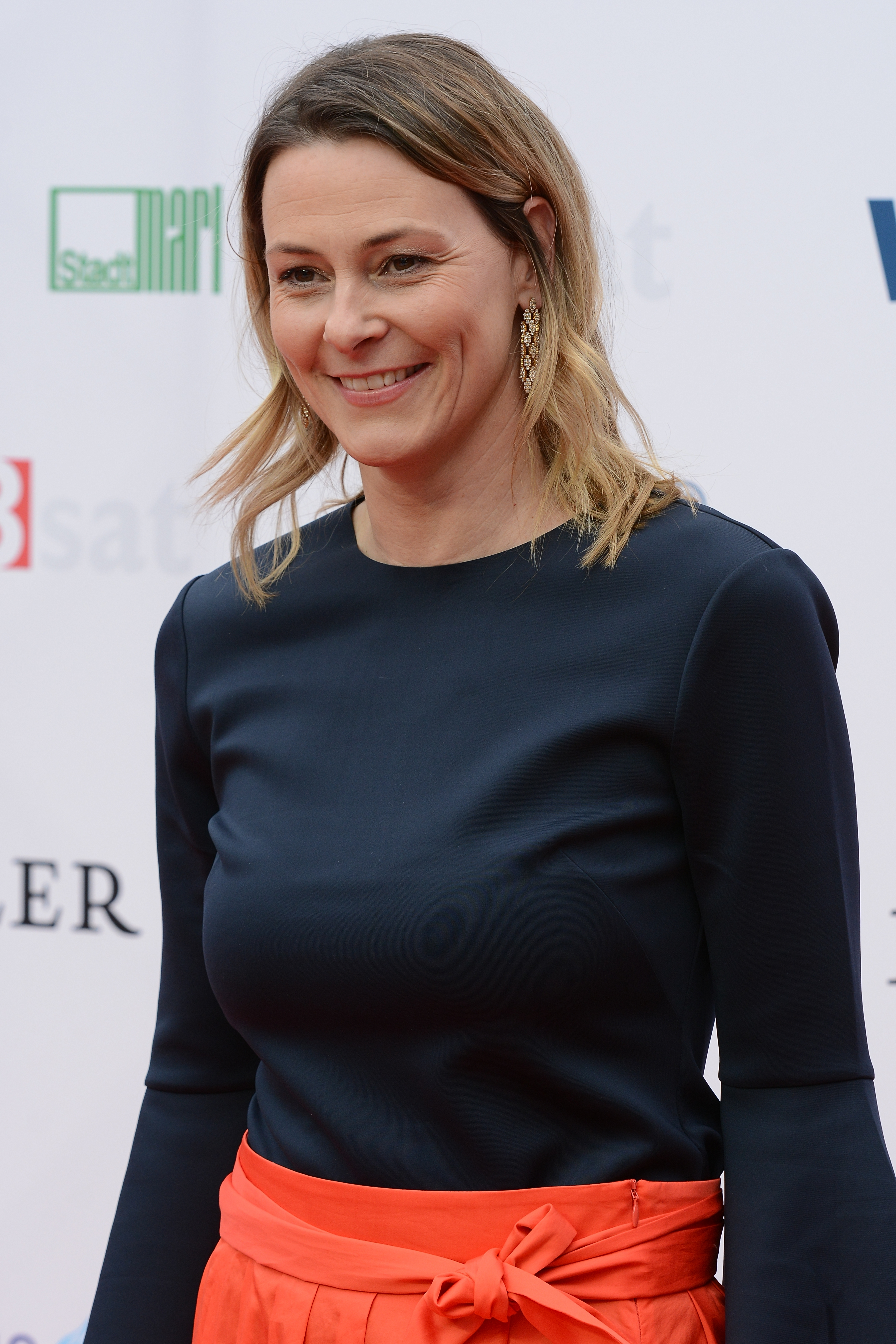 Verleihung des Grimme-Preises 2018.